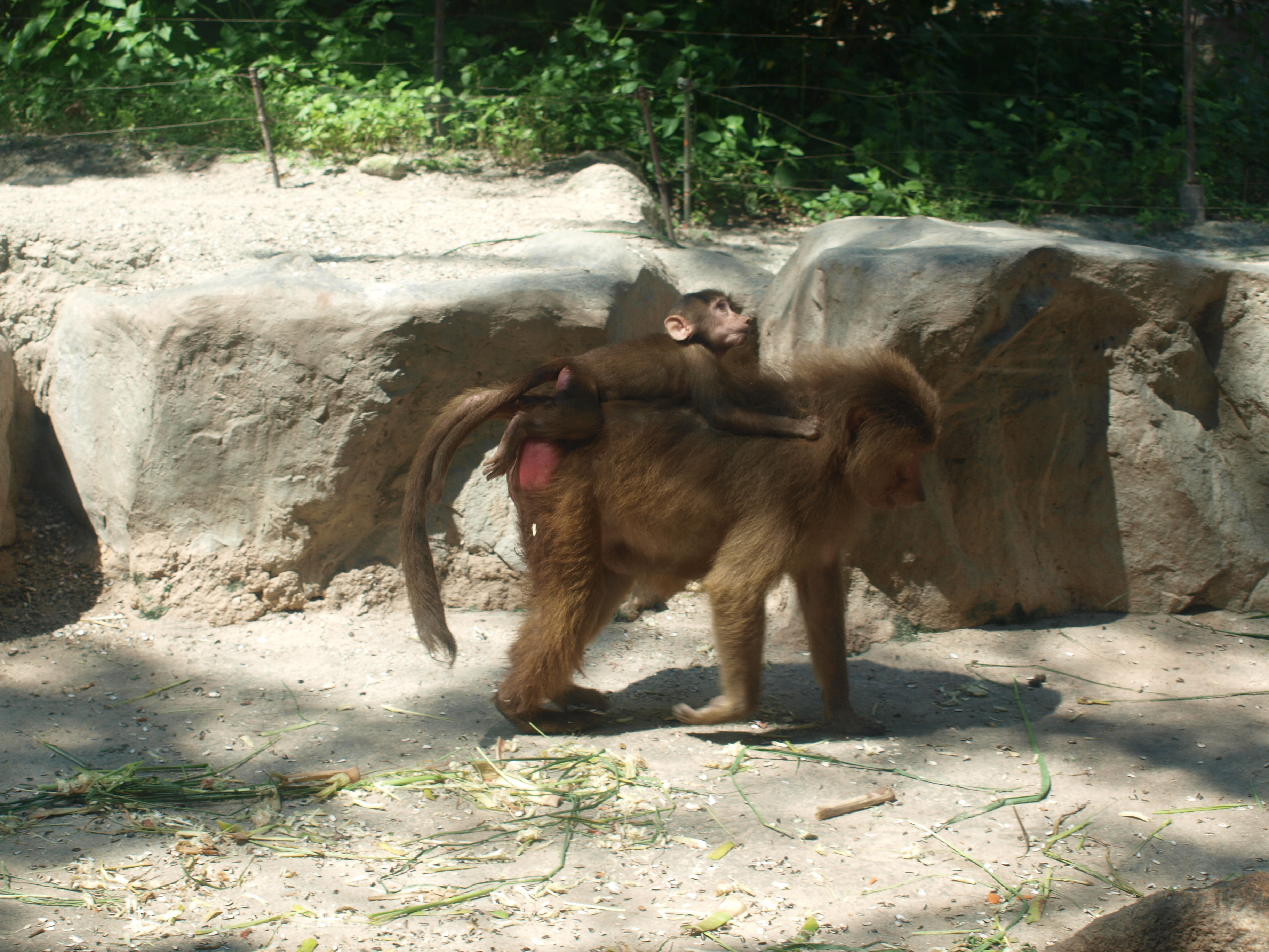 Hamadryas Baboon